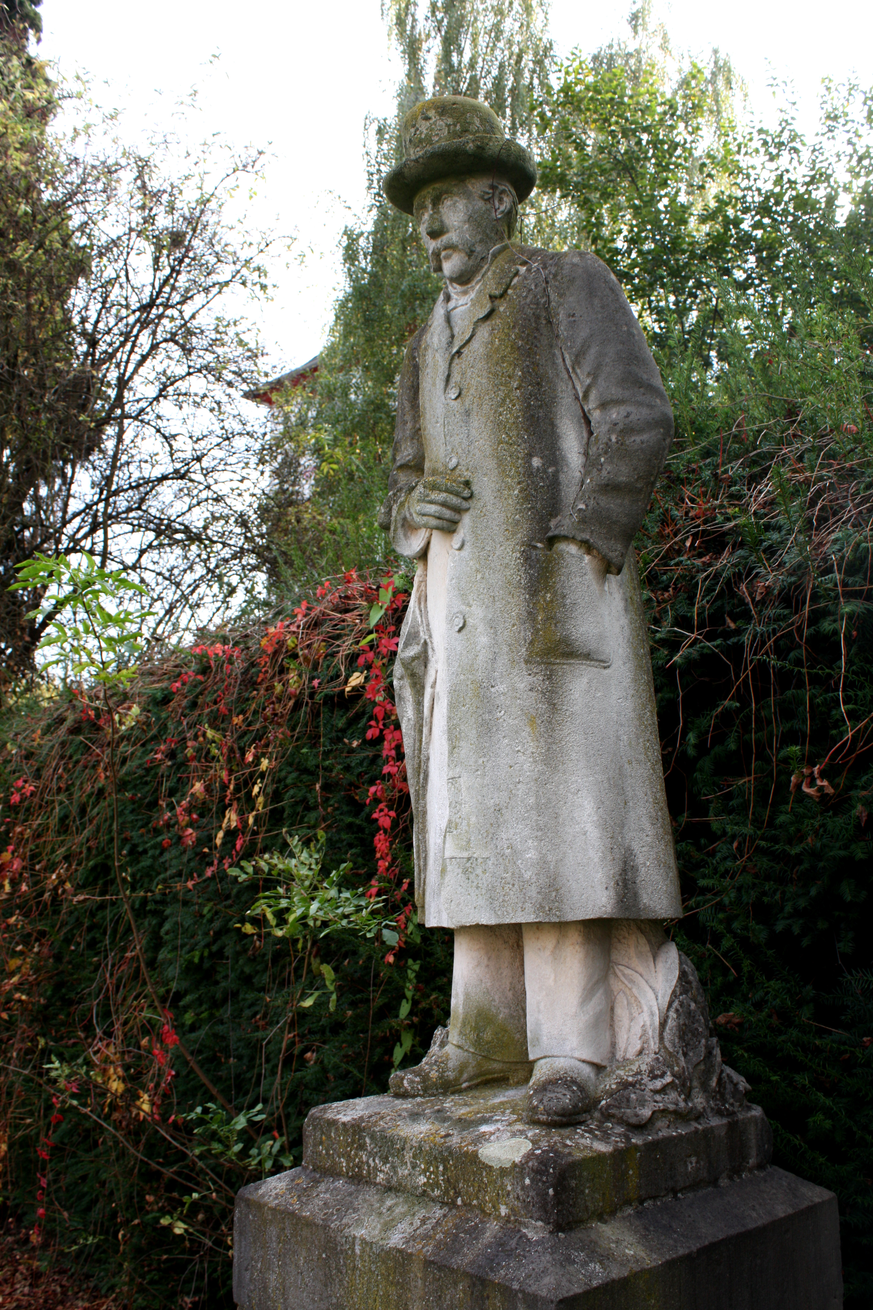 Hürth, Dr. Kuerten Denkmal